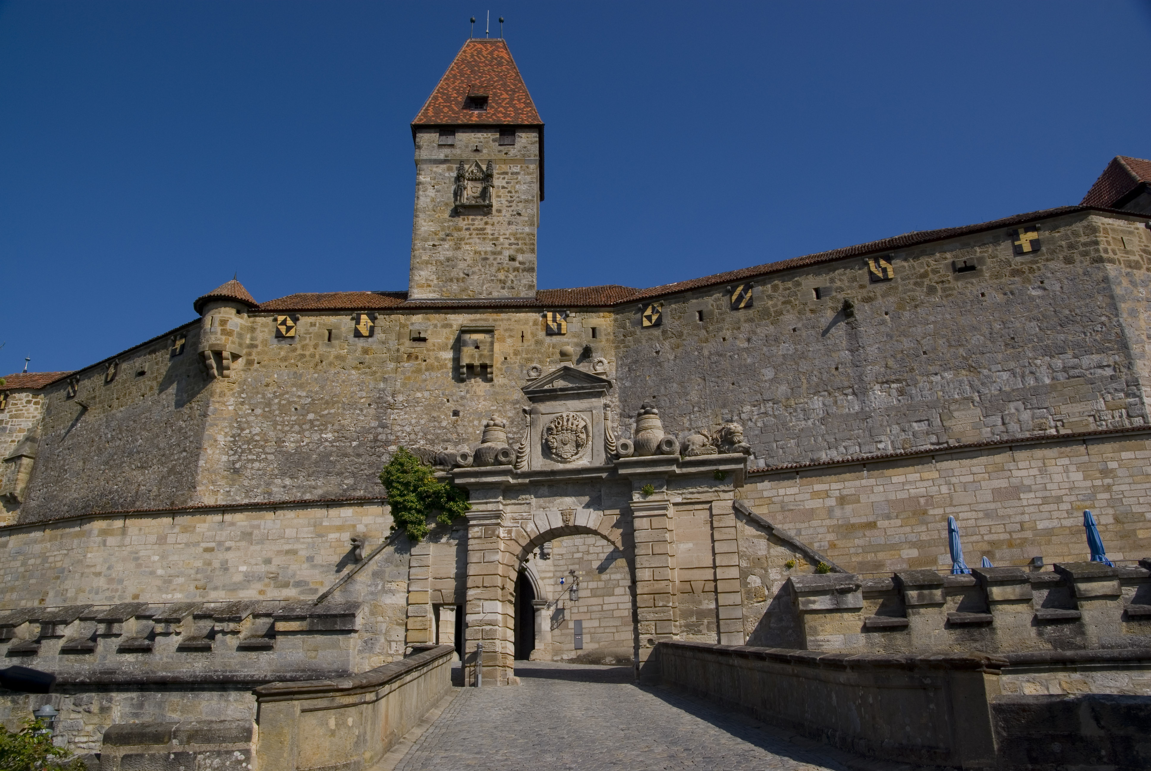 Veste Coburg, Portal mit Bulgarenturm